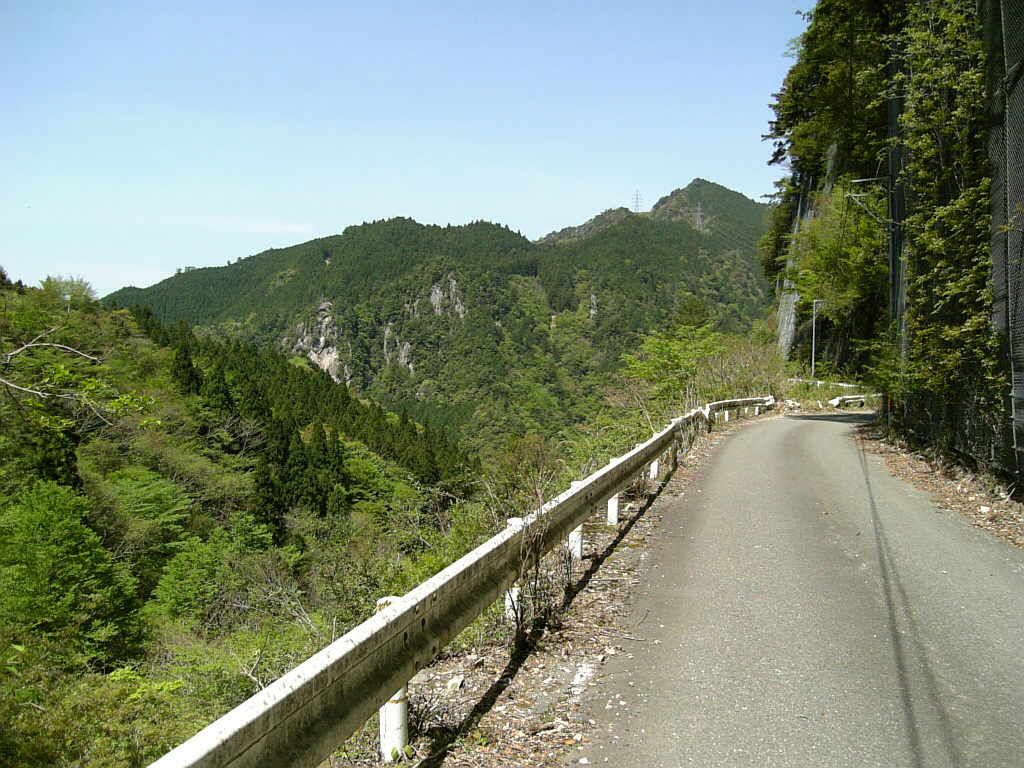 国道425号線沿線風景（十津川村大字上葛川付近）